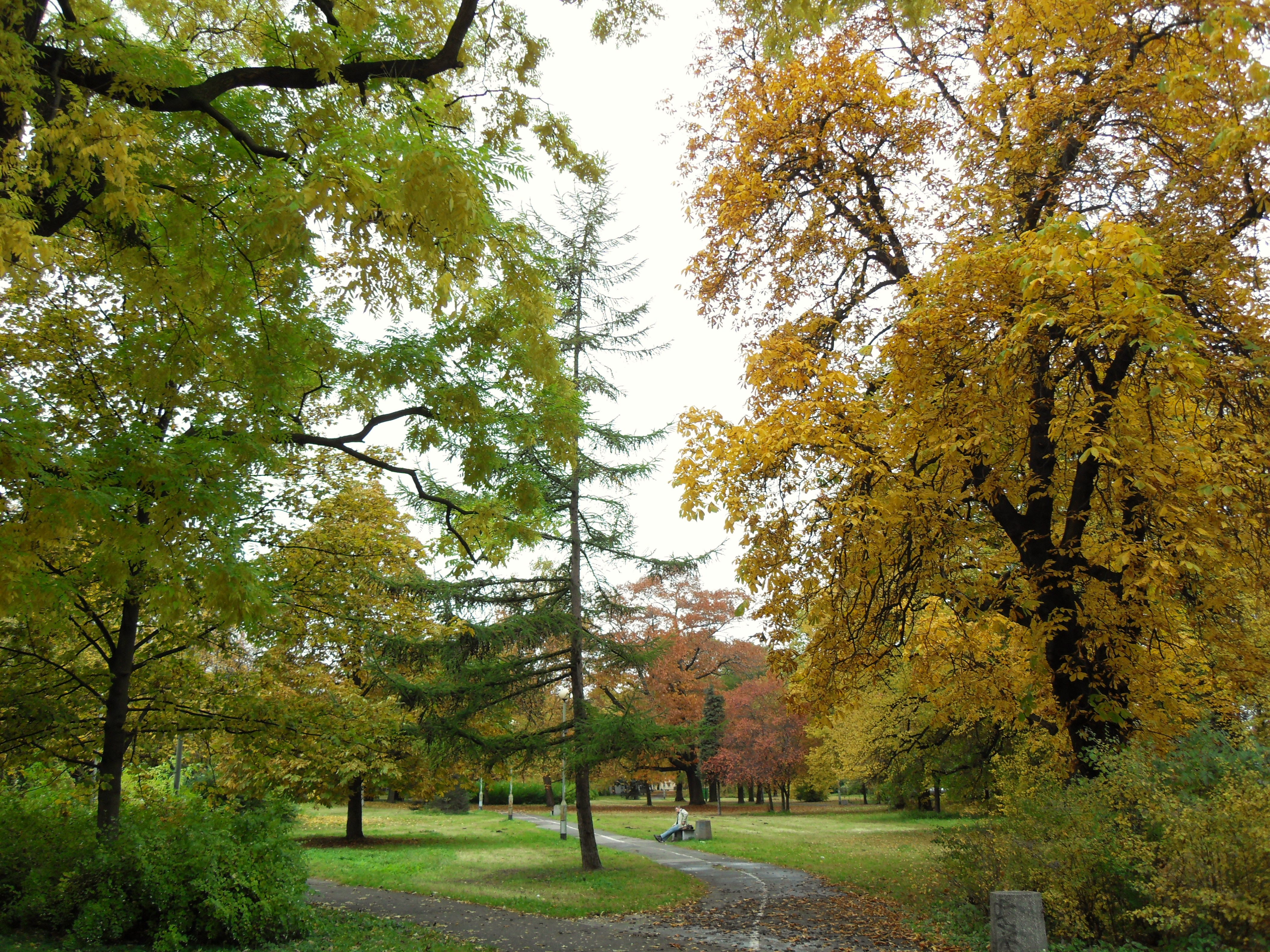 Gdańsk Aniołki. Park Steffensa.